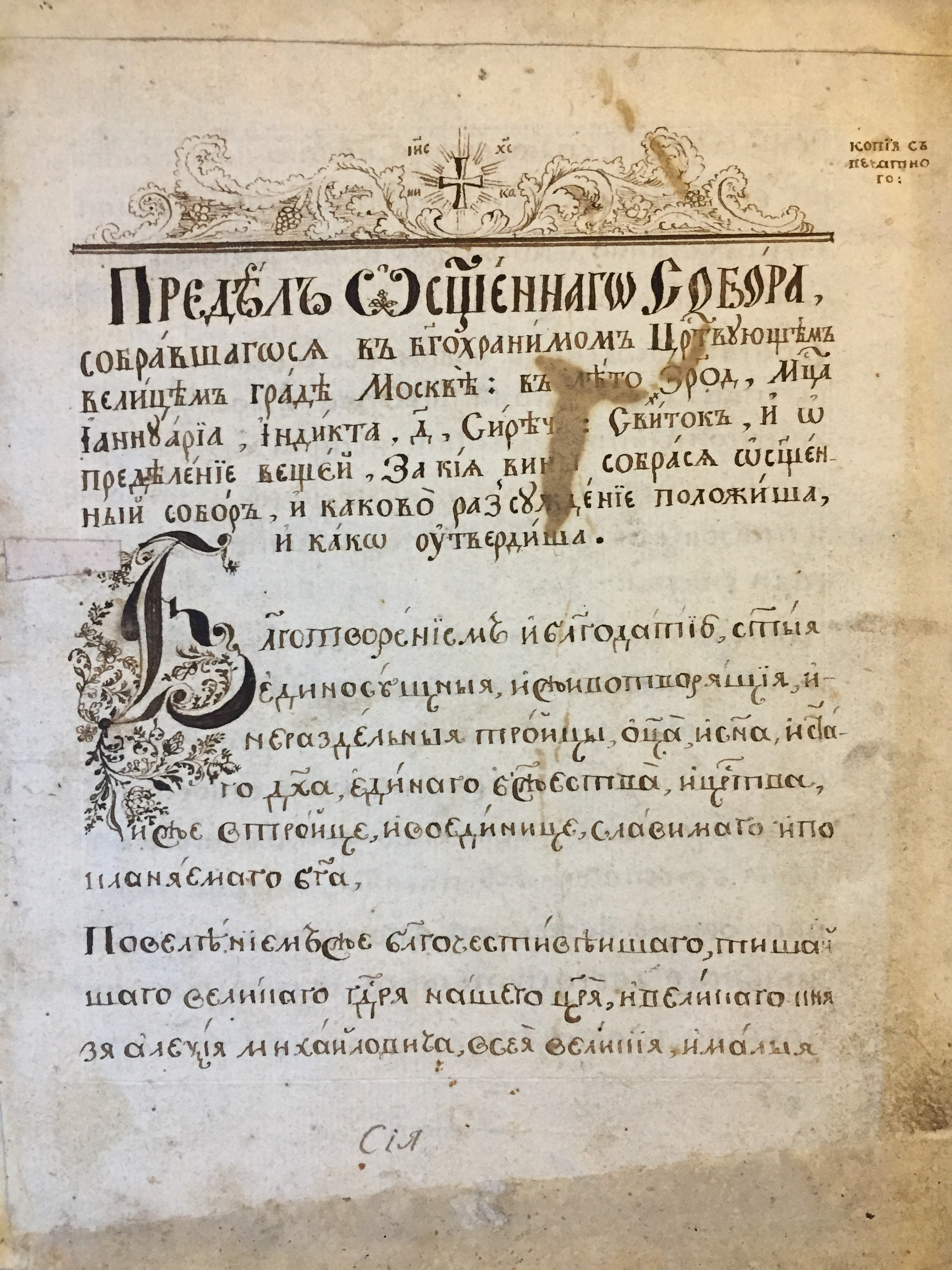 Определение Большого Московского собора ("Предел Освященного собора, собравшегося в Богохранимом царствующем велицем граде Москве в лето 7174 (1666) месяца ианнуария индикта 4 ..."). Частное собрание.